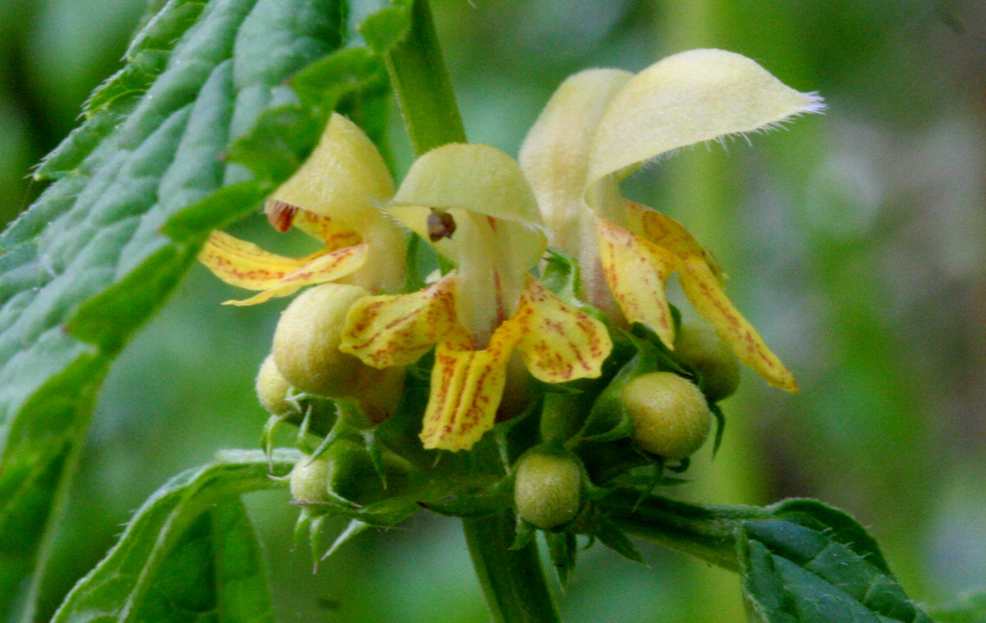 Falsa ortica gialla - Località : Le Laste, Limana (BL), 661 m s.l.m.